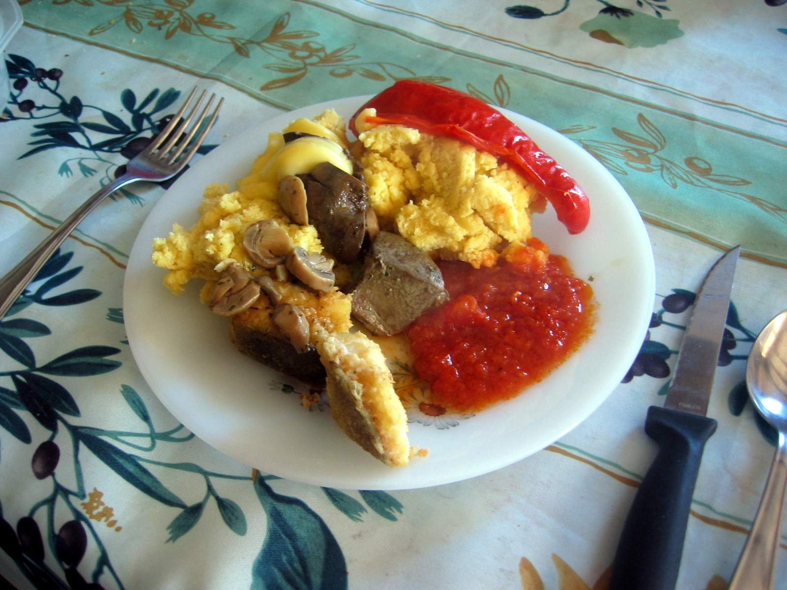 Gachas de panizo en plato, con acompañamiento de frituras.